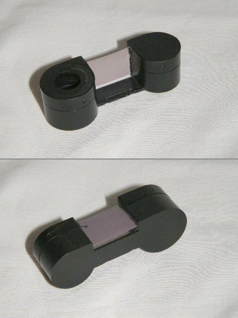 Кассета фотоаппарата Киев-30